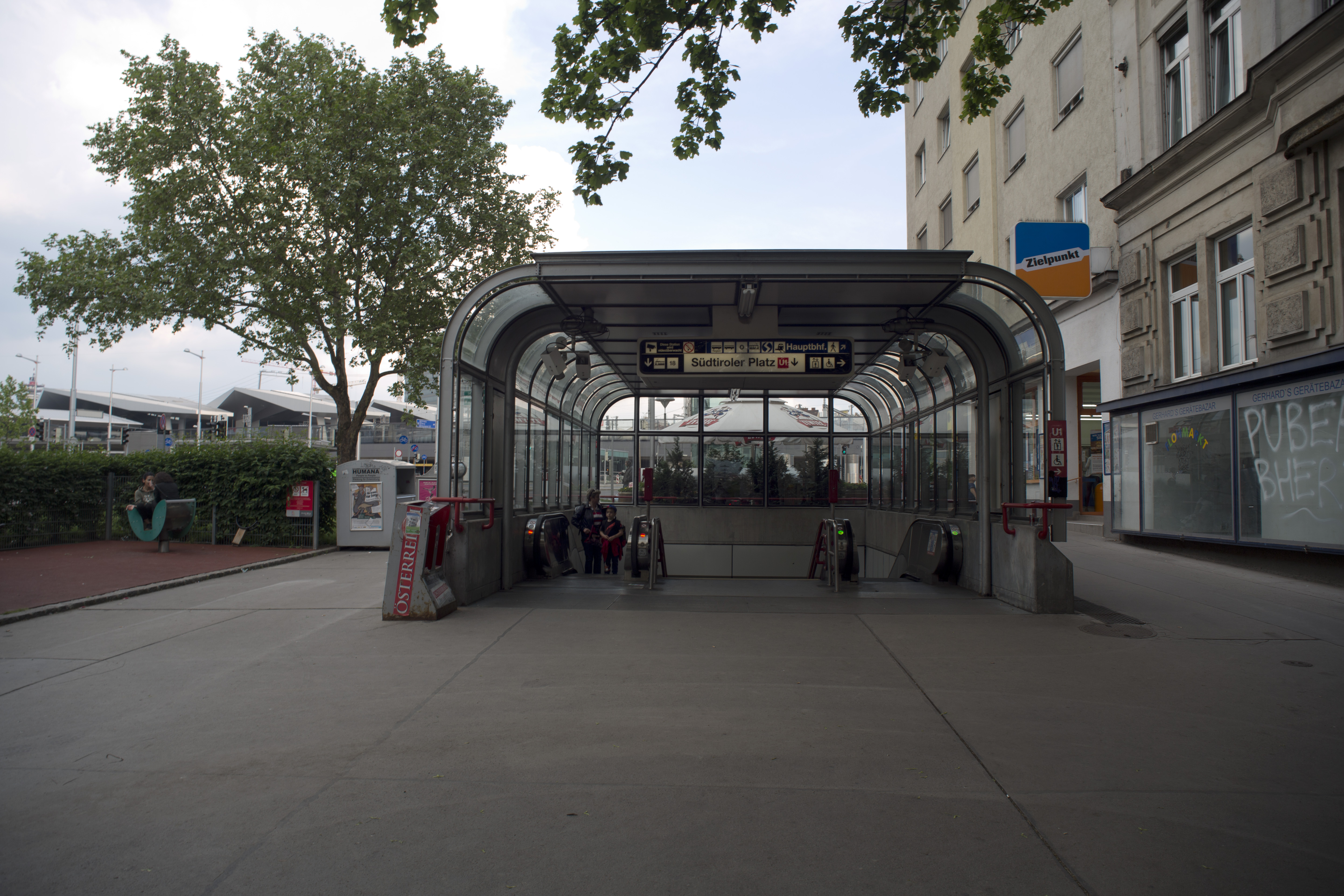 Südtiroler Platz U1-Stations Ausgang Wien